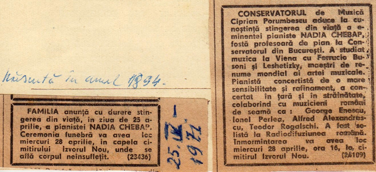 Nadia Chebap anunt deces